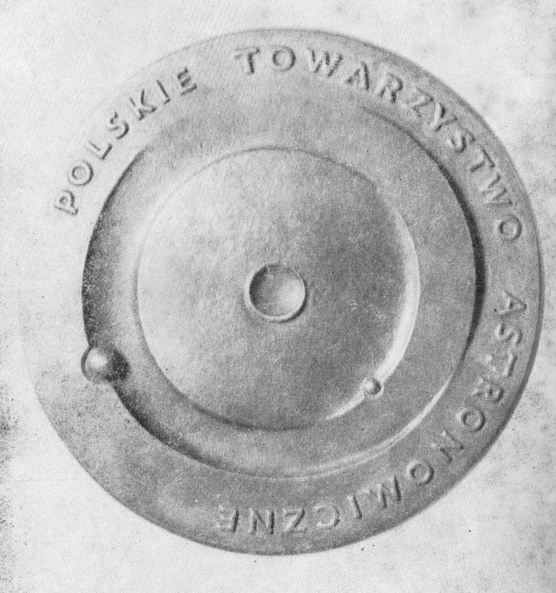 Rewers medalu im. Włodzimierza Zonna autorstwa Ewy Olszewskiej-Borys. Zdjęcie jest skanem z Uranii Miesięcznika Polskiego Towarzystwa Miłośników Astronomii, nr 12, grudzień 1983 roku, zdjęcie na drugiej stronie okładki.